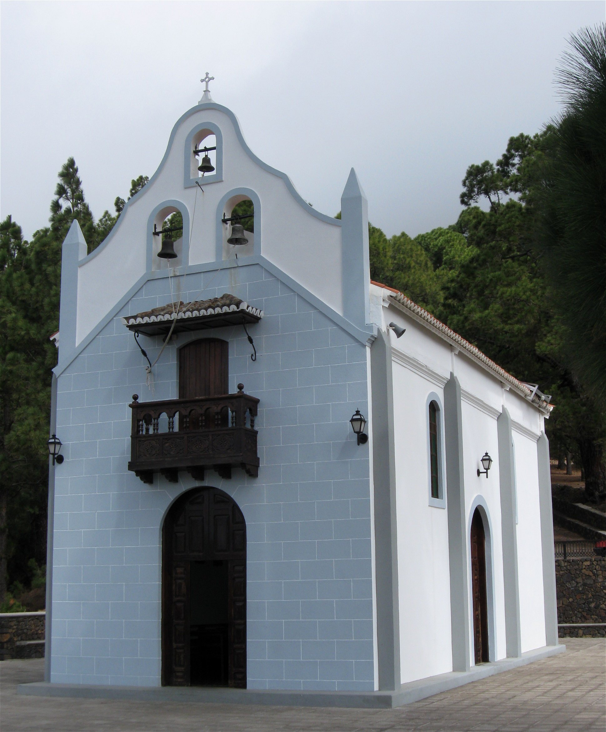 Ermita Pino de la Virgen, El Paso, La Palma